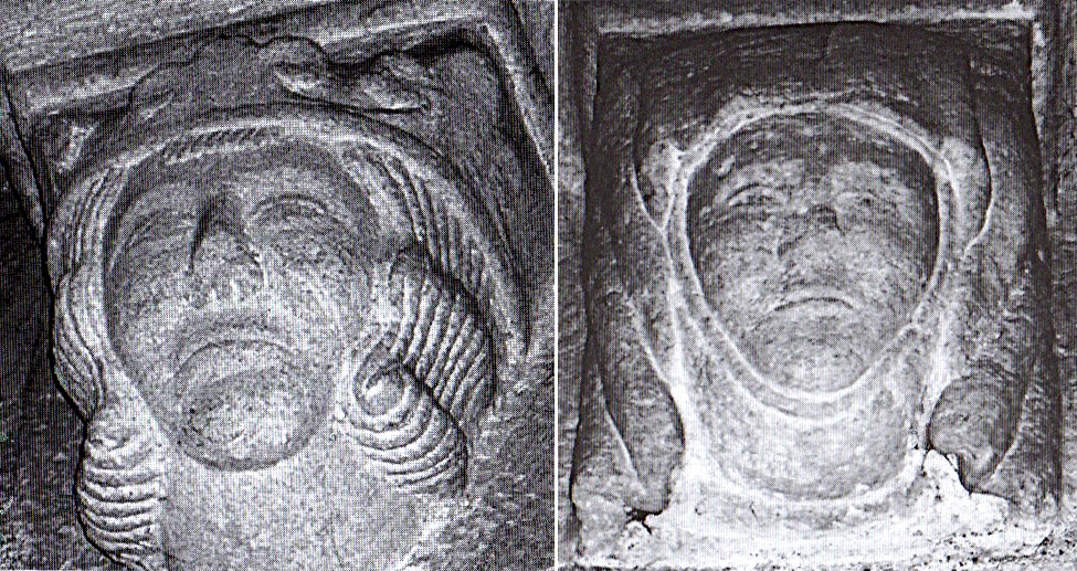 Culs-de-lampes sculptés dans la tour de Guise du château de Tours datant du XIIIe siècle